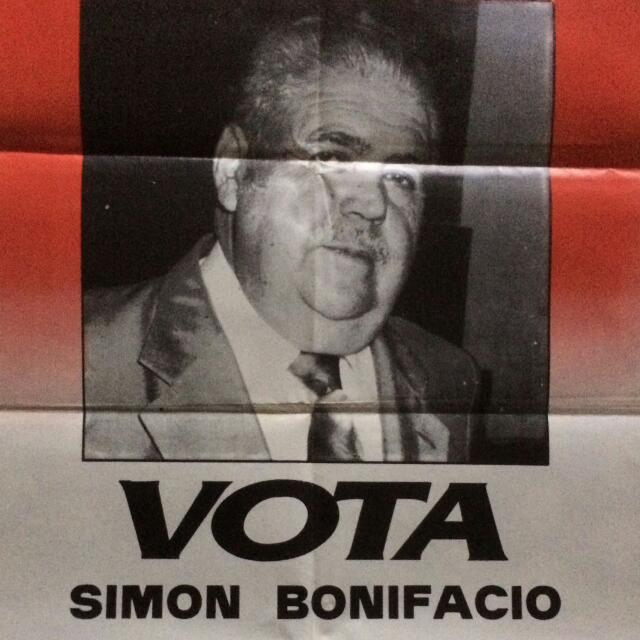 Simón Bonifacio como cabeza de lista